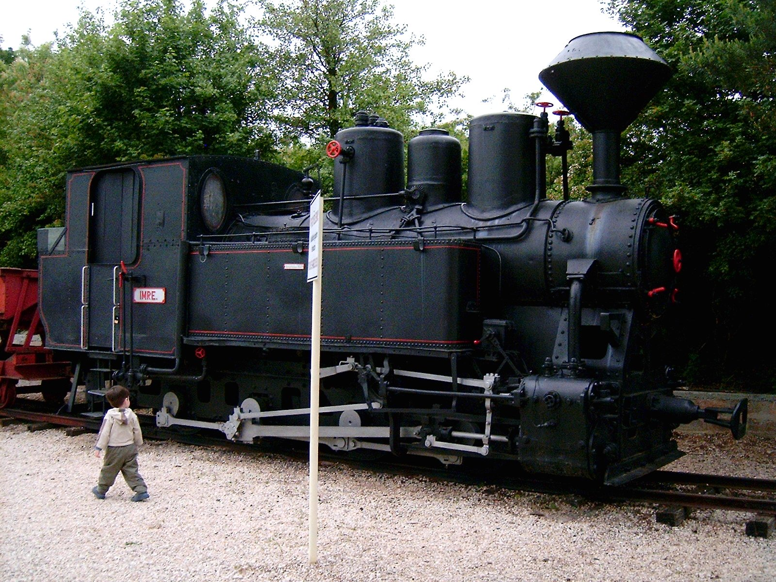 Keskeny nyomtávú gőzmozdony a gánti bányamúzeumban. Gánt (Fejér megye, Vértes-hegység), 2005. május